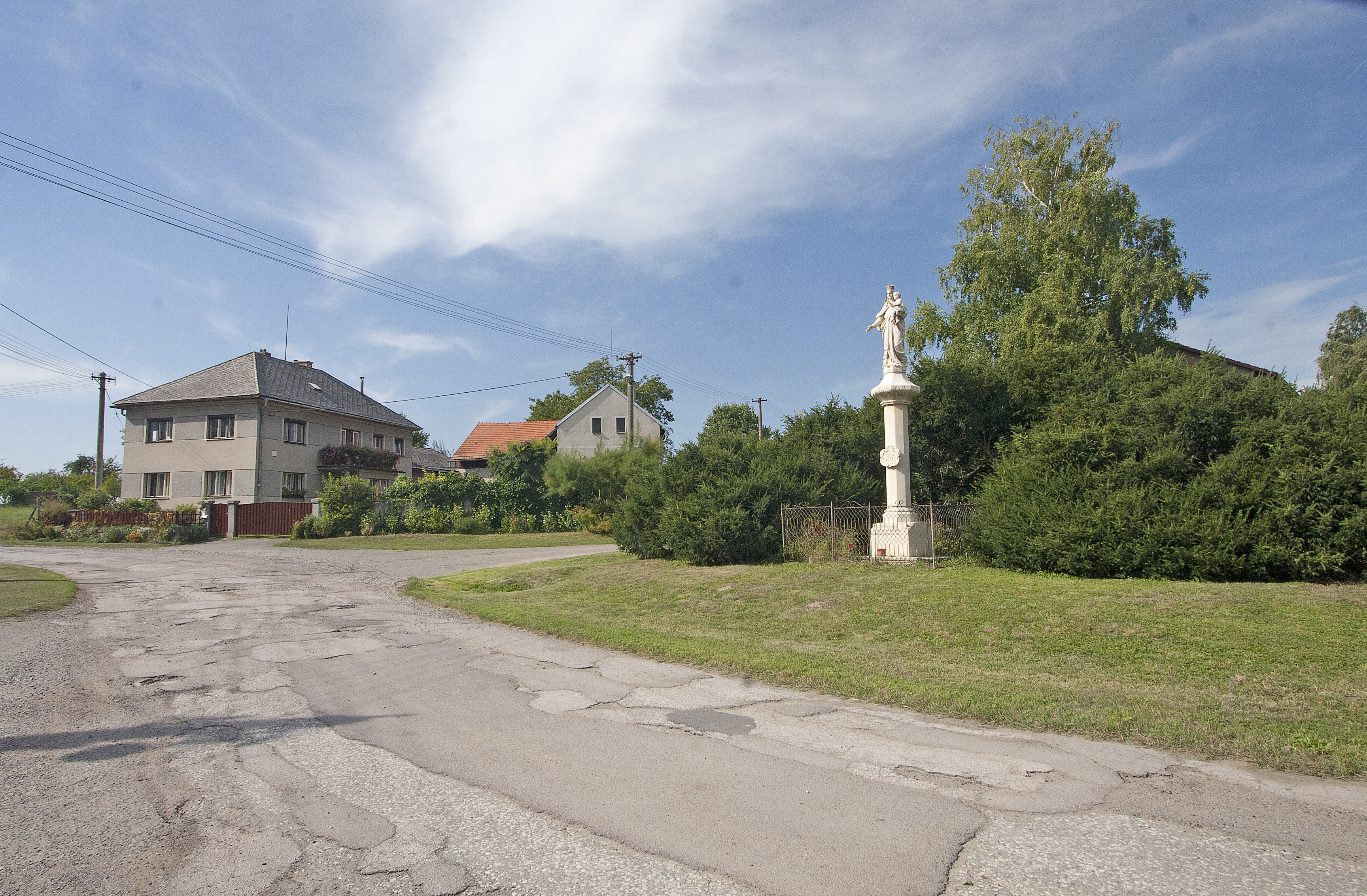 Dub - sloup se sochou Panny Marie